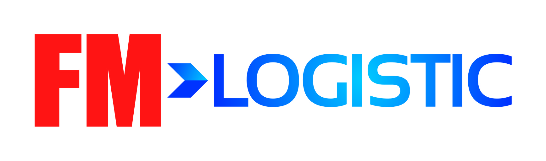 Logo Fm logistic.